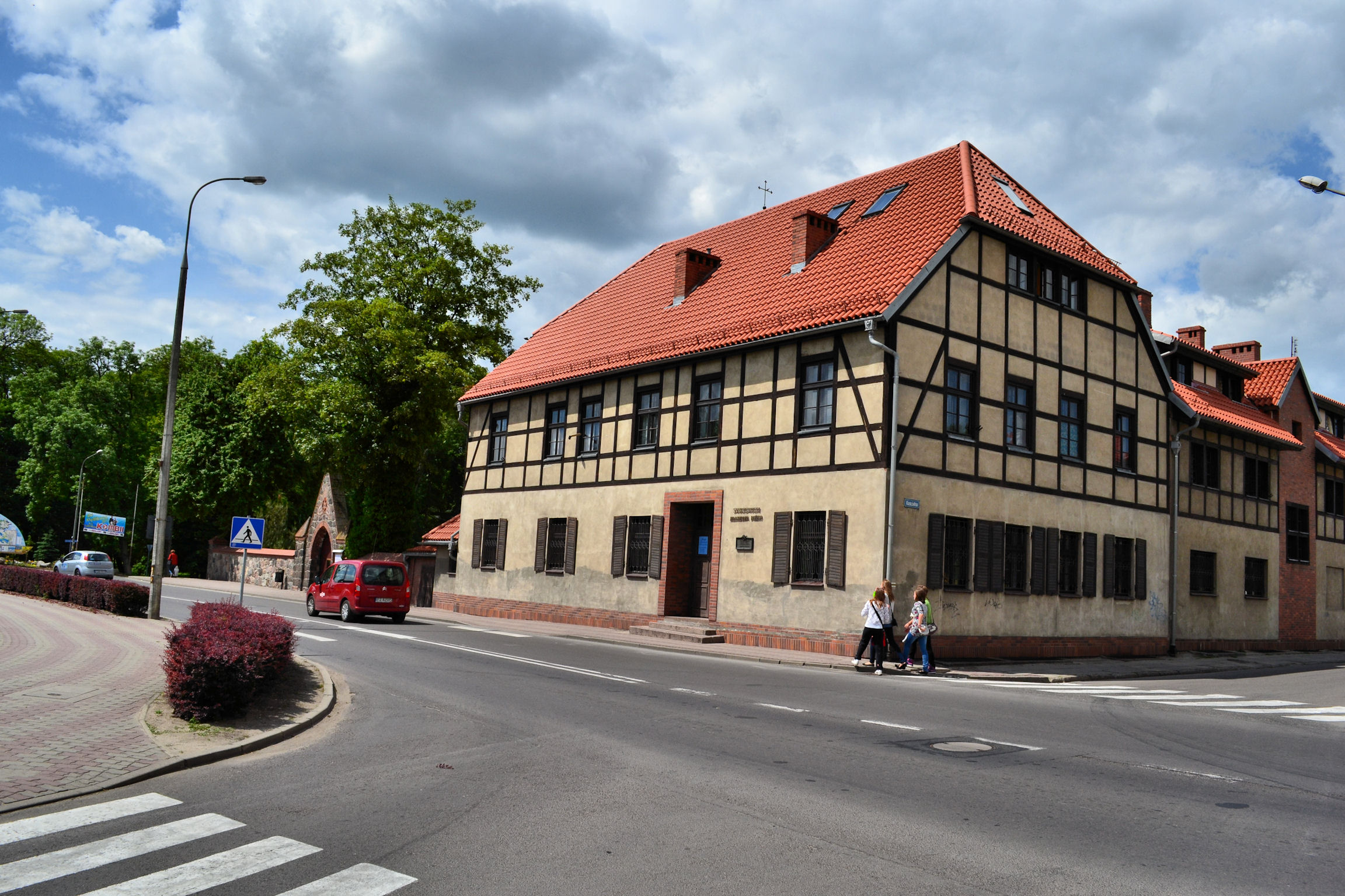 Myślibórz Sanktuarium Miłosierdzia Bożego